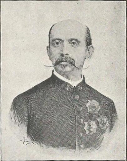 Amador del Villar y Pérez de Castropol